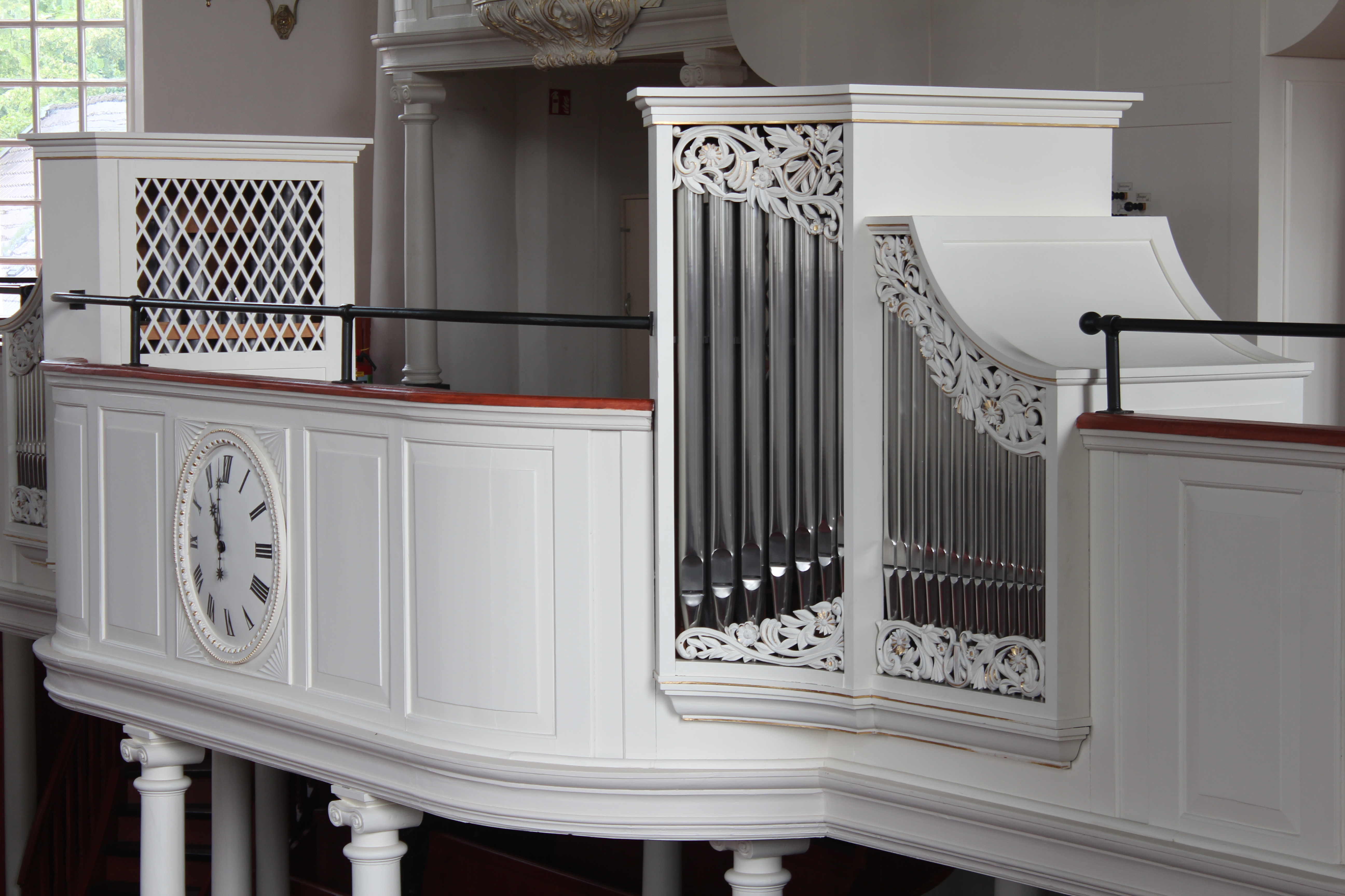 Rückpositivgehäuse der Orgel der Großen Kirche zu Leer, Ostfriesland, von der Seitenempore aus gesehen